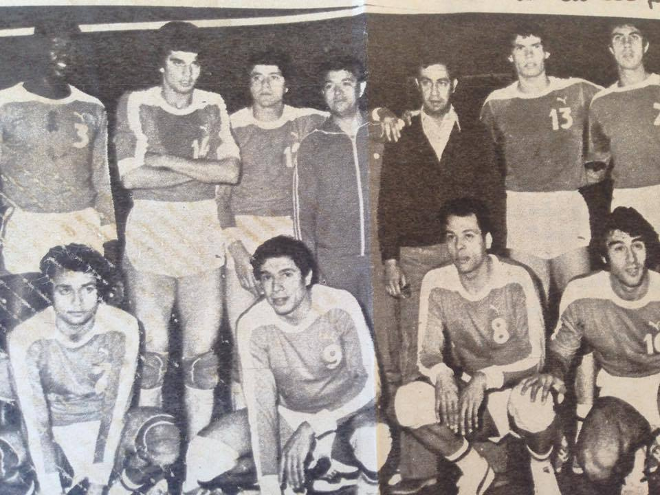 Ahly volleyball first team in 1970's